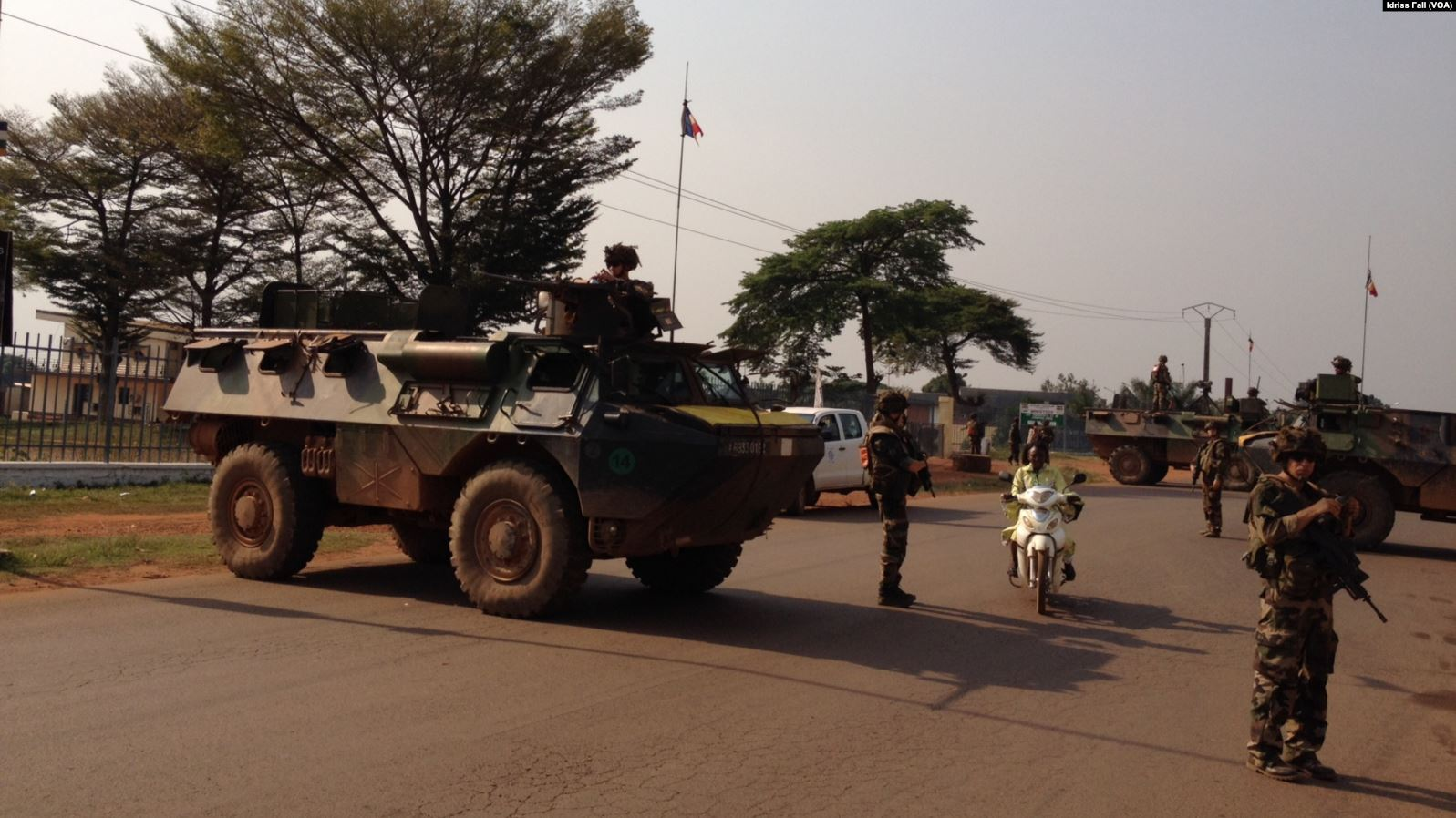 Les soldats français en position à Bangui, République Centrafricaine. Décembre 22, 2013